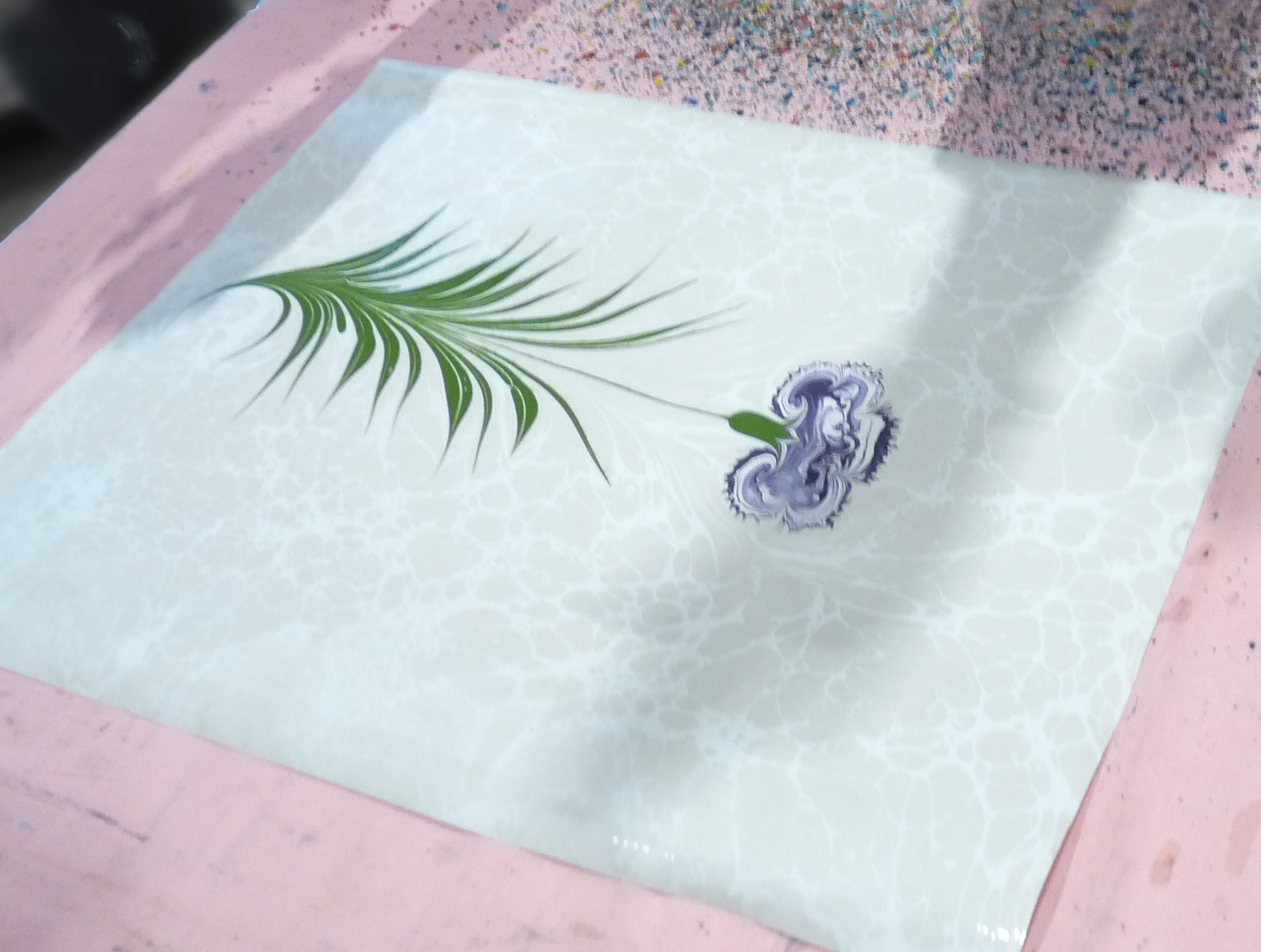 Démonstration de la technique de l'ebru (papier marbré traditionnel turc) dans le cadre du Festival international de géographie 2012 à Saint-Dié-des-Vosges (pays invité : la Turquie)